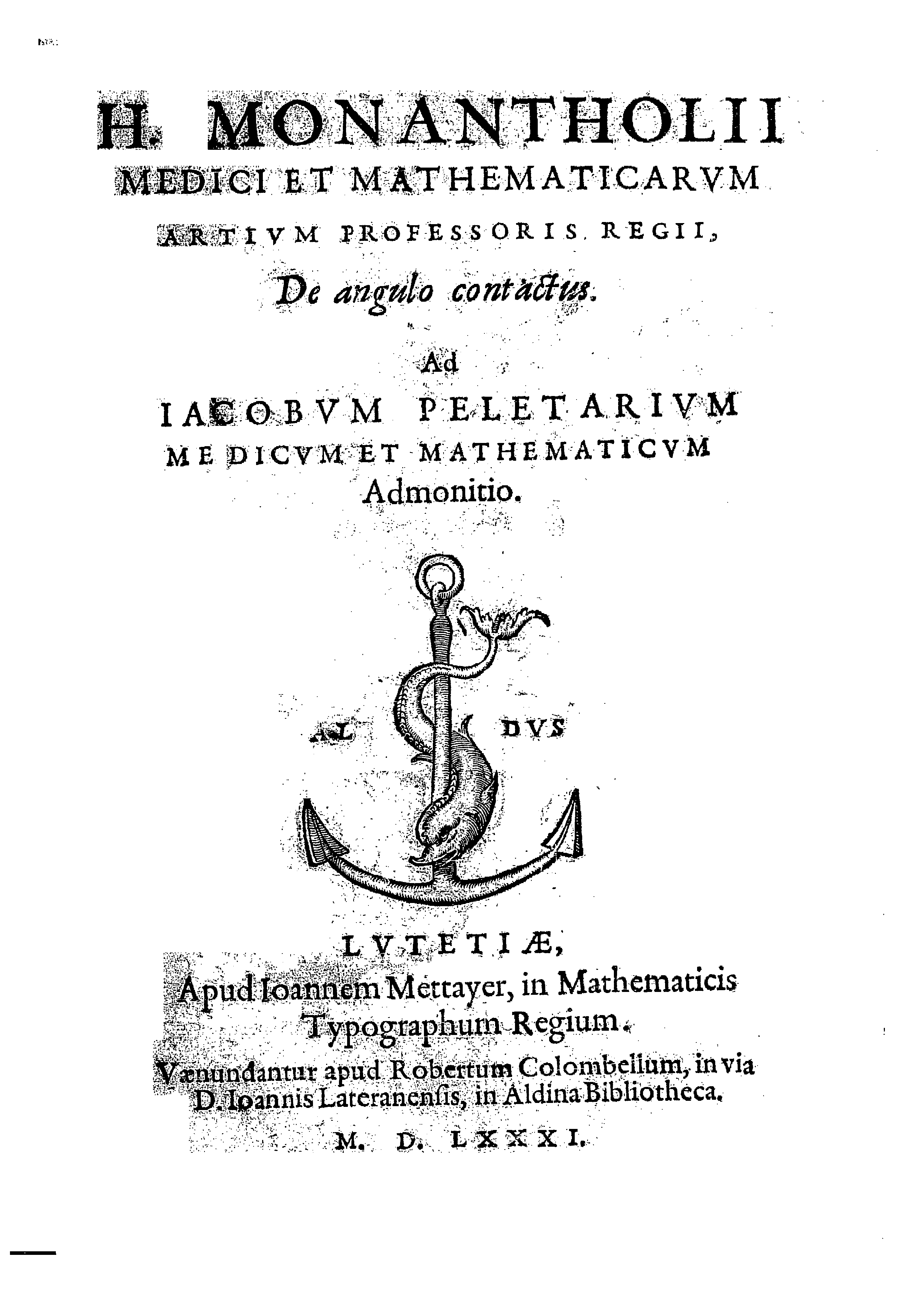 H. Monantholii medici et mathematicarum artium professoris regii, De angulo contactus. Ad Iacobum Peletarium medicum et mathematicum admonitio. - Lutetiae : apud Ioannem Mettayer, in mathematicis typographum regium : vaenundantur apud Robertum Colombellum, in via D. Ioannis Lateranensis, in Aldina Bibliotheca, 1581. - [28] p. : ill. ; 4º .